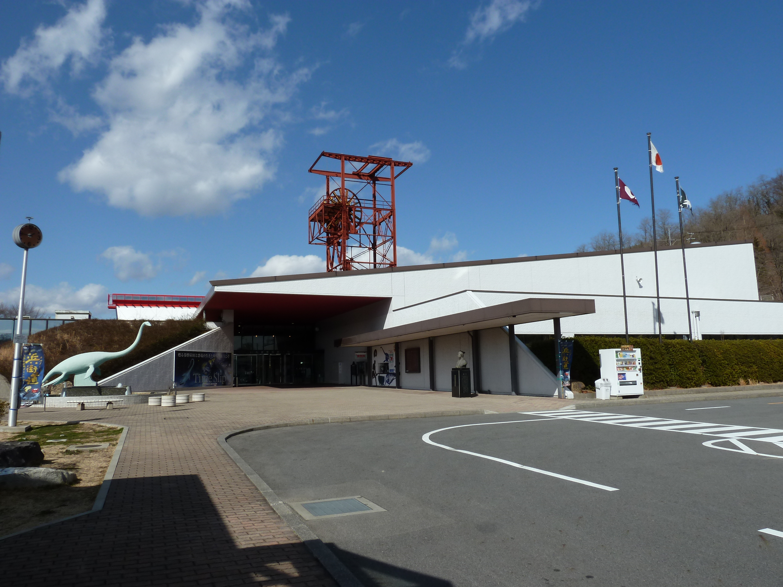 いわき市石炭化石館